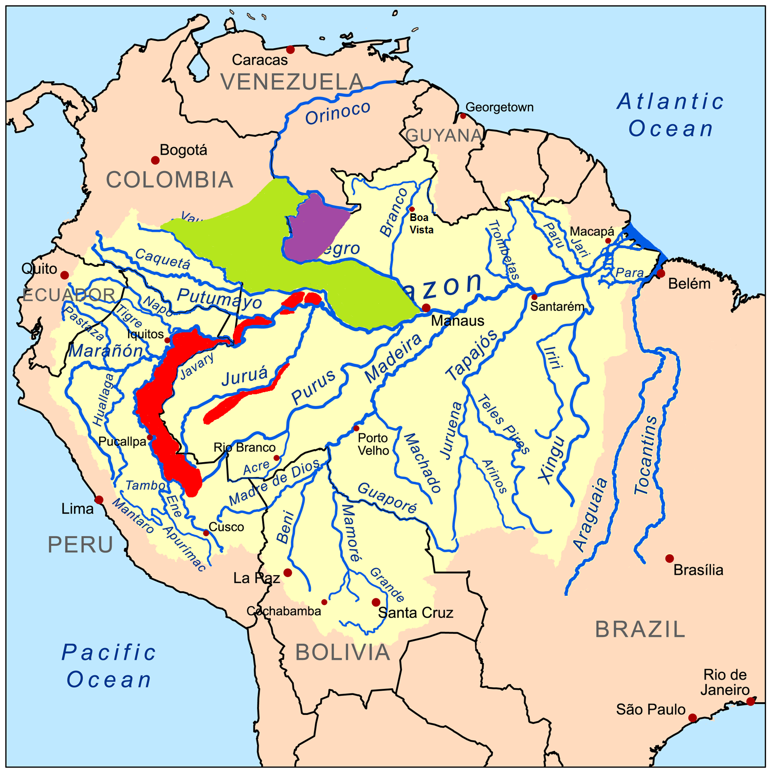 Die Verbreitungsgebiete der drei Uakariarten: rot - Cacajao calvus violett - C. melanocephalus grün - C. ouakary